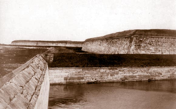 Новодвинская крепость. Вдали виден Флажный бастион, на переднем плане - ров, за ним - Рогаточный бастион